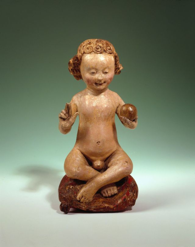 Het naakte Christuskind zit met gekruiste beentjes op een kussentje. Het heeft de rechterhand zegenend opgeheven. In de linkerhand draagt het de wereldbol. Zijn glimlachende gezicht is omgeven door ronde, aan de zijkant uitstaande krullen. Het kussentje is versierd met kwastjes op iedere hoek en rust op een lage, zeshoekige sokkel. Het incarnaat is roze, over een gelige laag, op een witte grond. Het haar en de wereldbol zijn verguld, op een geelbruine bolus. Het kussentje vertoont resten van lichtrood, over resten van vergulding op donkerrood en enkele sporen blauw. Het beeldje is rondom bewerkt. Het vormt één geheel met de sokkel. In de zijkanten en bovenop het hoofd bevinden zich in totaal drie konische gaatjes. Achter het konische gaatje bovenop het hoofd bevinden zich twee onregelmatiger gaatjes met resten metaal en rechts naast het konische gaatje een onregematig, sleufvormig gat (houtworm?). In het midden van het standvlak een schroefgaatje, iets meer naar achteren een vrij diep gat, ca. 6 mm doorsnede, deels afgedekt door een modern, opgelijmd stukje karton. Afgebroken zijn: het kruisje op de wereldbol, enkele krullen aan de rechterkant van het hoofd en één aan de linkerkant, alle franjes van de kwastjes en het bolletje van het kwastje aan de voorste rechterpunt van het kussentje. Een deel van de sokkel is afgezaagd. De polychromie is over de gehele oppervlakte beschadigd. Een houtwormgaatje in de sokkel.